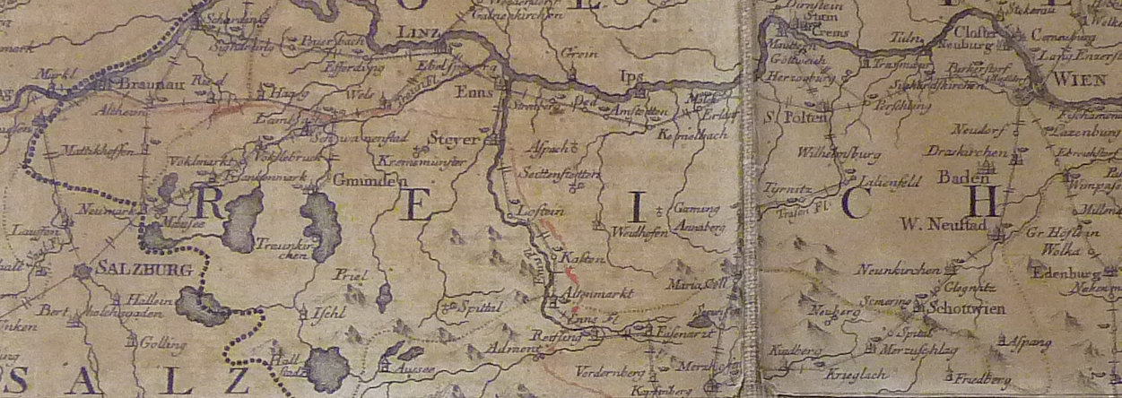 Ausschnitt Salzburg-Wien der Landkarte der österreichischen Erbländer